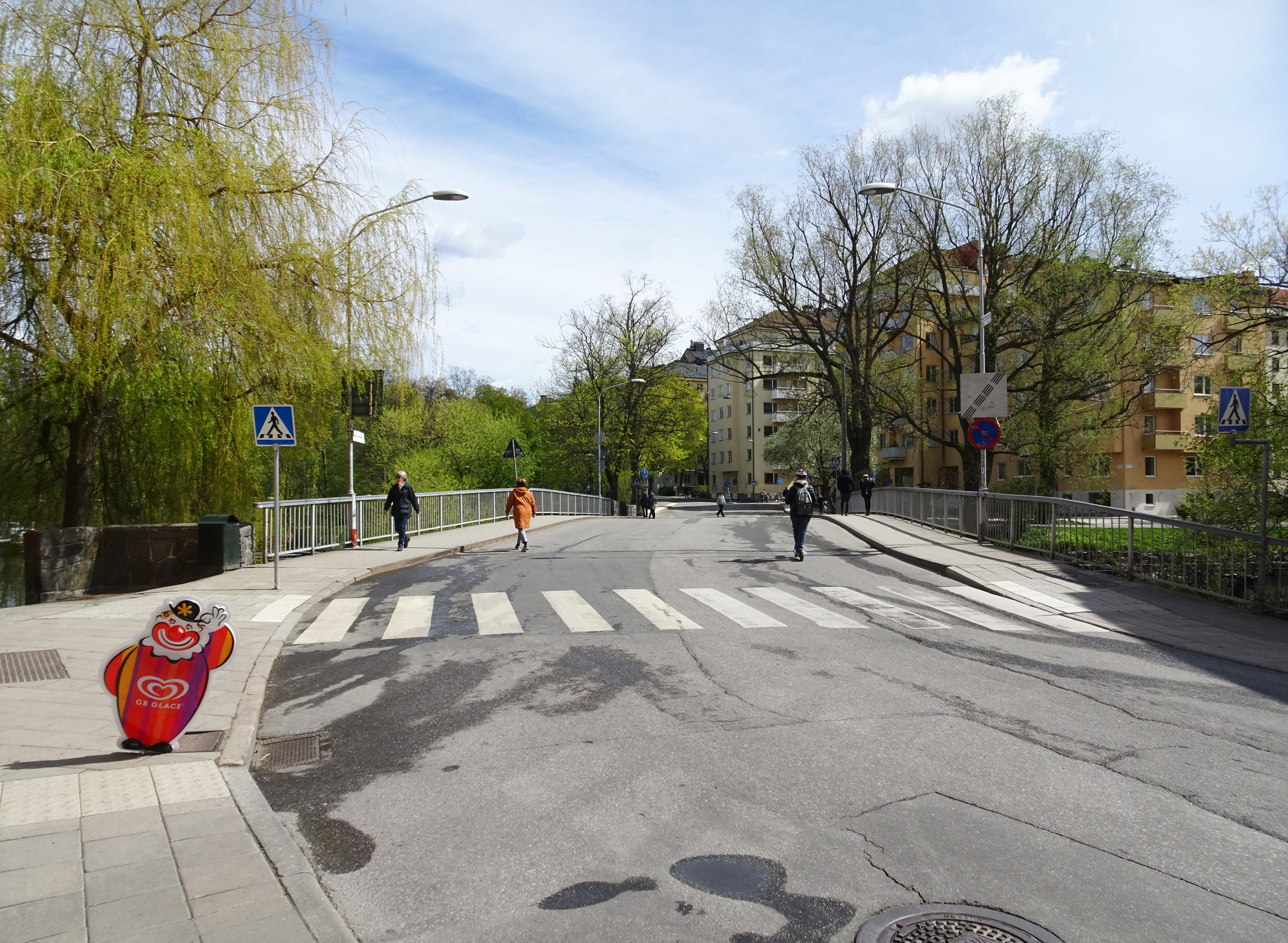 Reimersholmsbron